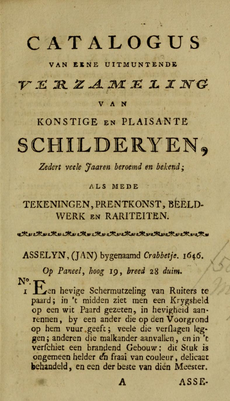 Catalogus van een uitmuntend cabinet konstige en plaisante schilderijen, teekeningen, prentkonst, beeld-werk en rariteiten, p. 1.